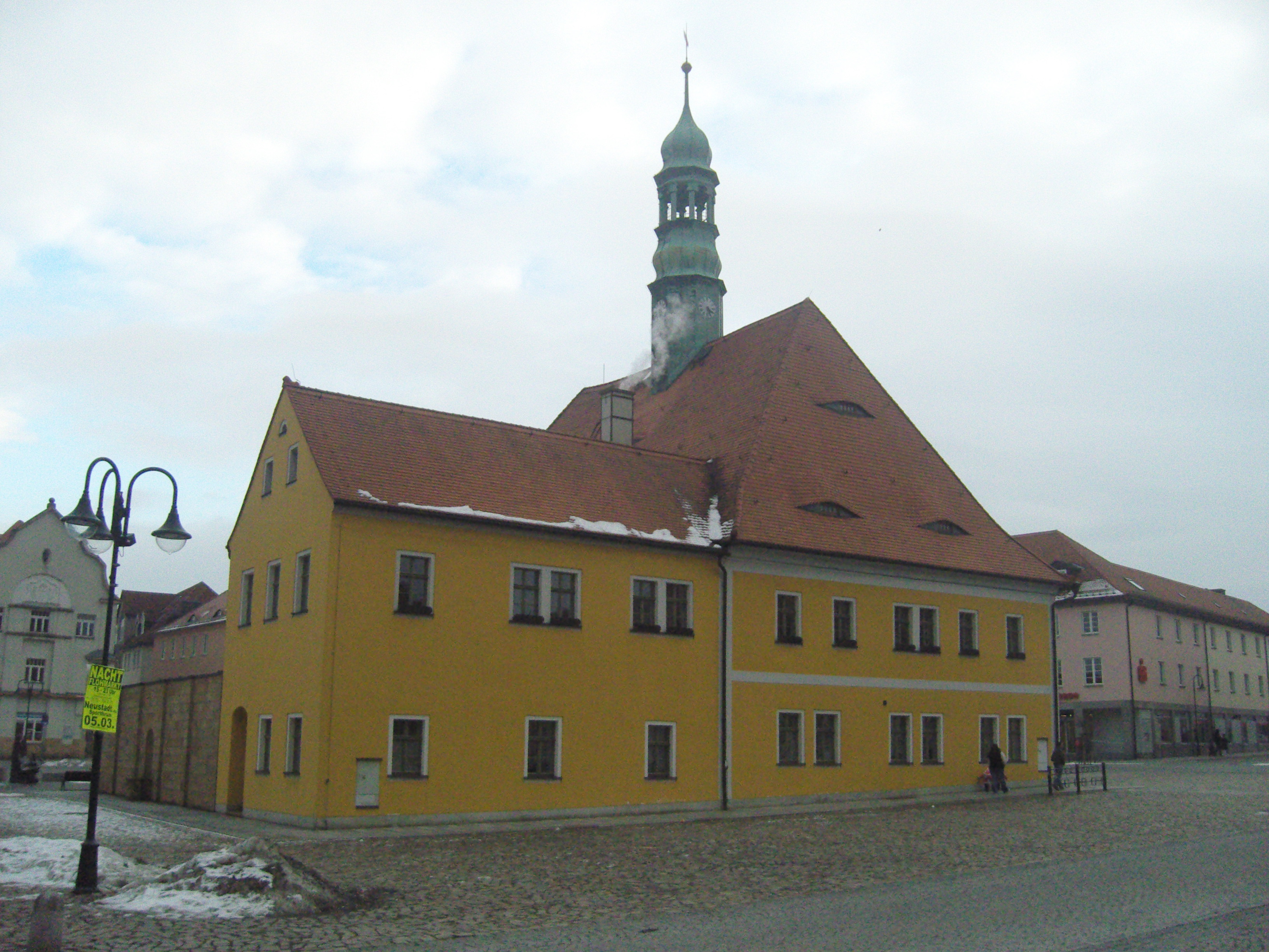 Rathaus Neustadt in Sachsen